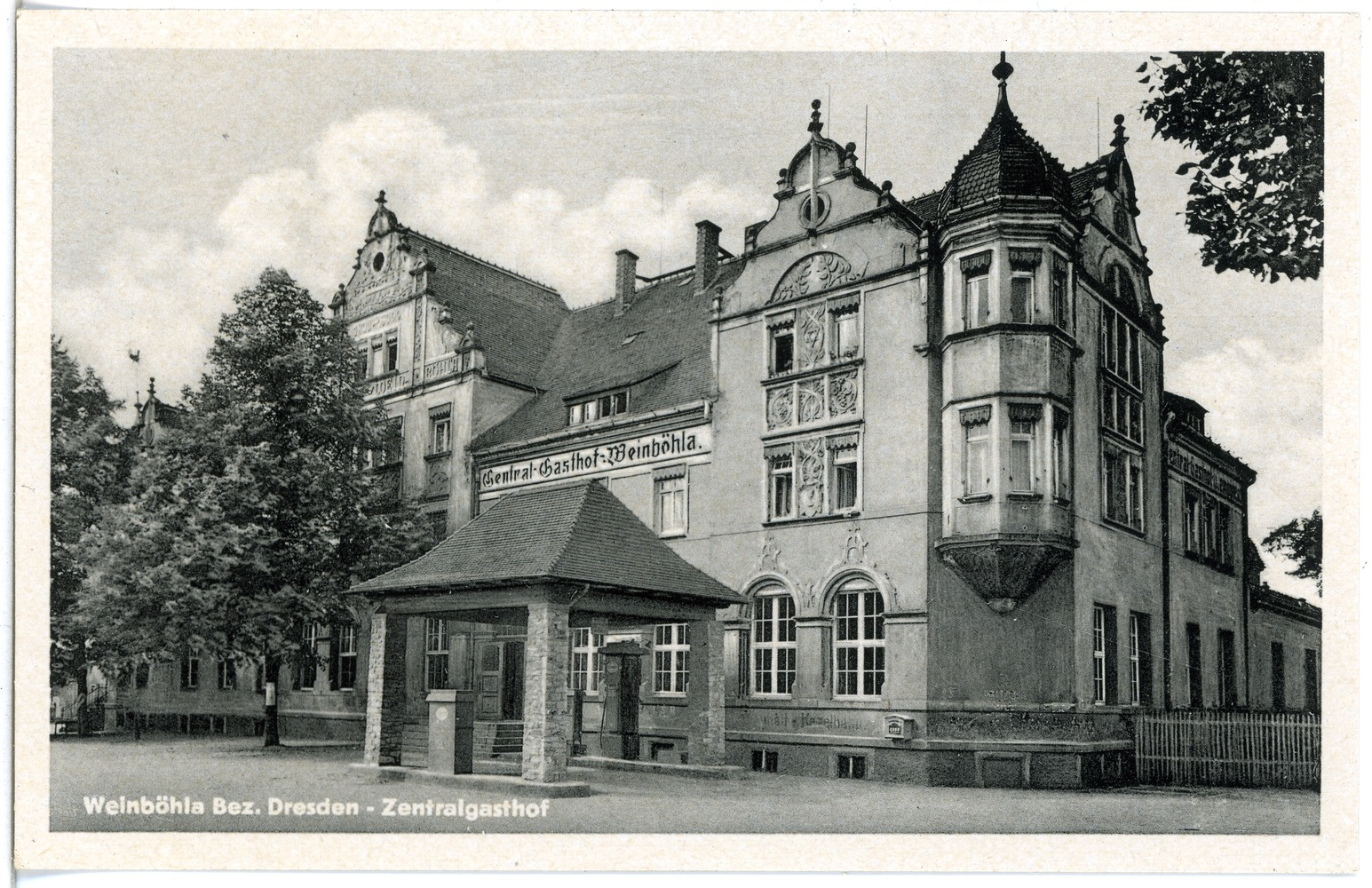 Weinböhla; Zentralgasthof This postcard is from publisher Brück & Sohn in Meißen ( postcard has a unique number 28270 and is available in a higher resolution at the publisher. This images was uploaded in a cooperation project between Wikipedians and the publisher.